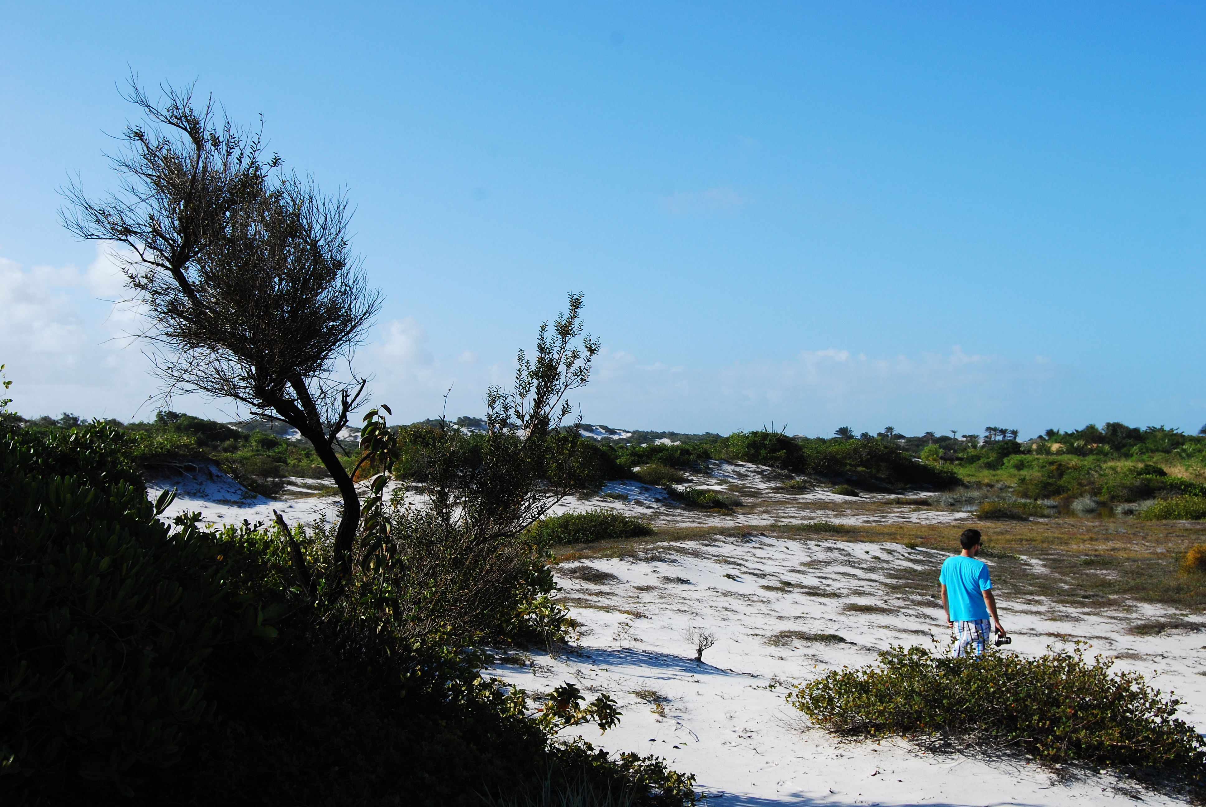 Parque das Dunas.